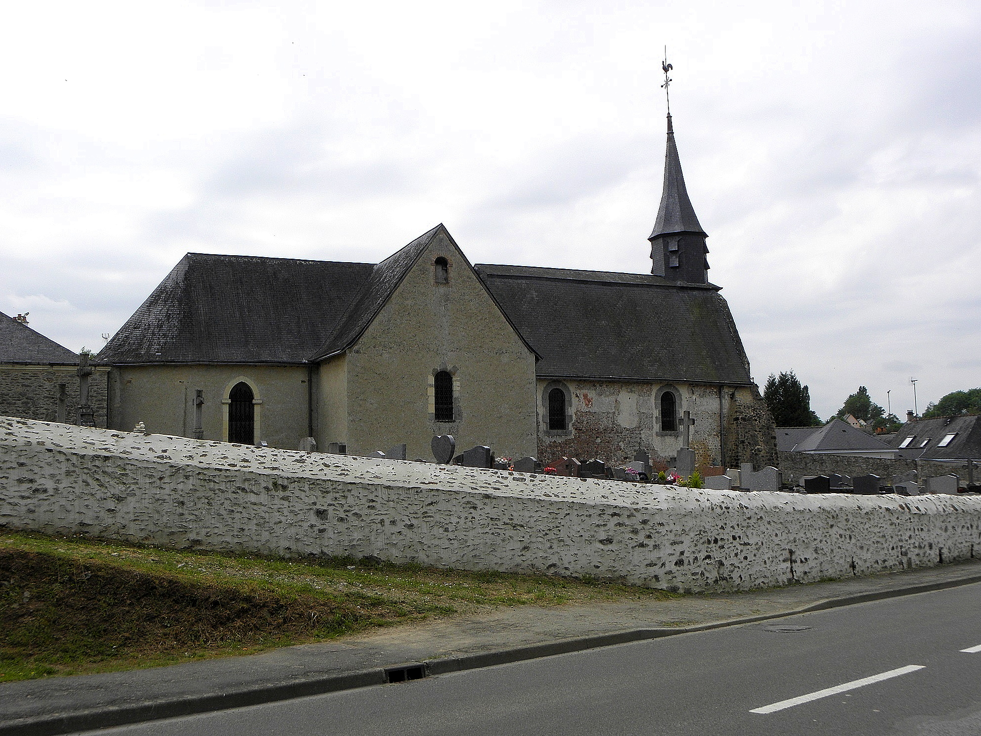 Église Sainte-Marie-Madeleine de Forcé (53). Vue septentrionale.